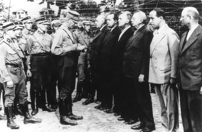 ADN-ZB-Archiv Mit der Machtübernahme durch die Hitlerregierung begannen die Jahre der faschistischen Diktatur in Deutschland, die Jahre des Terrors Progromstimmung gegen Kommunisten, Sozialdemokraten und andere antifaschistische Kräfte, das waren die ersten Auswirkungen der Hitlerdiktatur. Bereits im Februar 1933 entstanden die ersten Konzentrationslager. Auch eine Reihe sozialdemokratischer Funktionäre wurden im August 1933 von SA-Schergen verhaftet und in das Konzentrationslager Sachsenhausen bei Oranienburg verschleppt. Unter ihnen waren - auf dem Foto von rechts nach links: Kurt Magnus, Hans Flesch, Heinrich Giesecke, Alfred Braun, Friedrich Ebert und Ernst Heilmann.